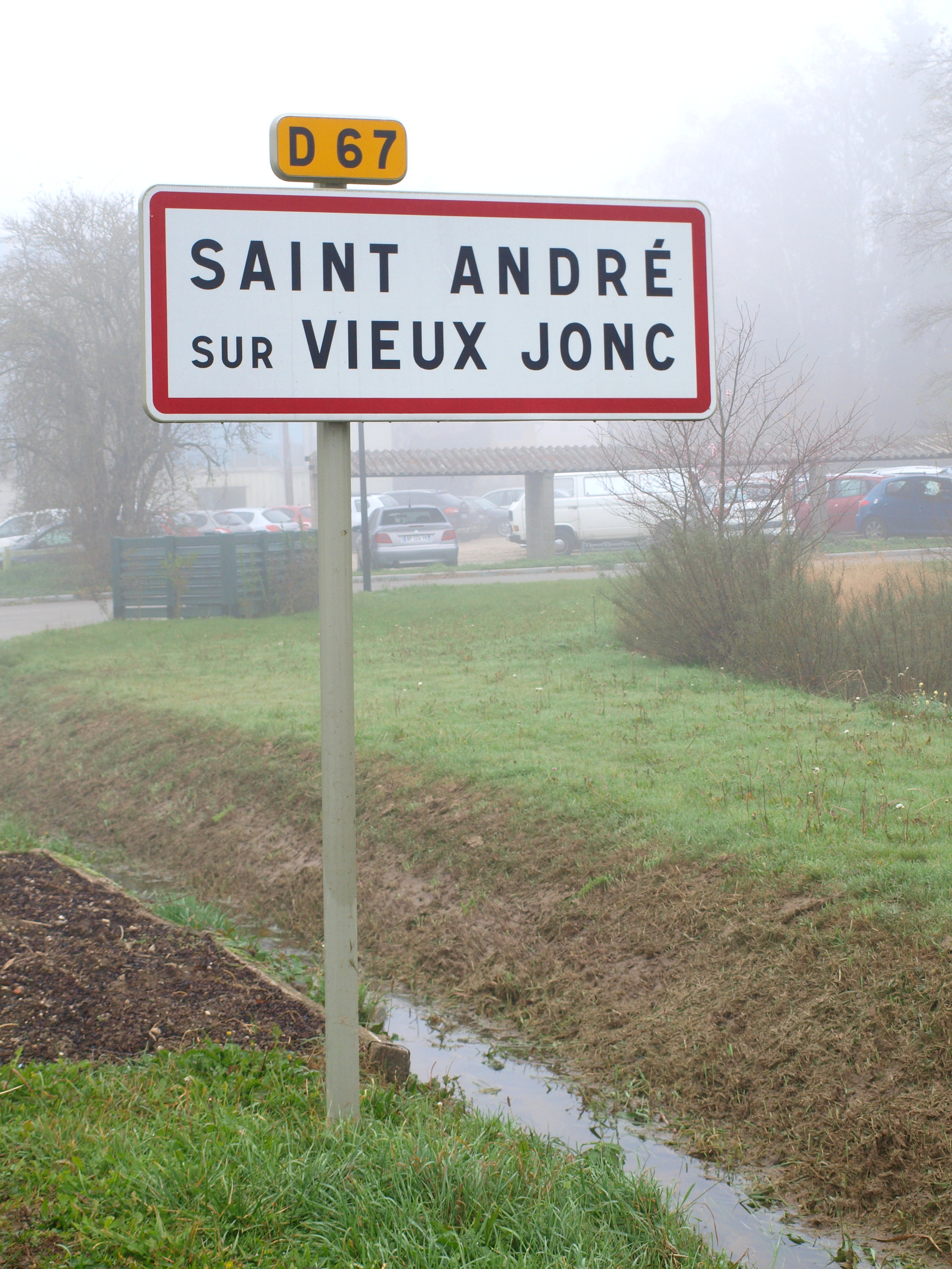 Saint-André-sur-Vieux-Jonc (Ain, France) , panneau d'agglo